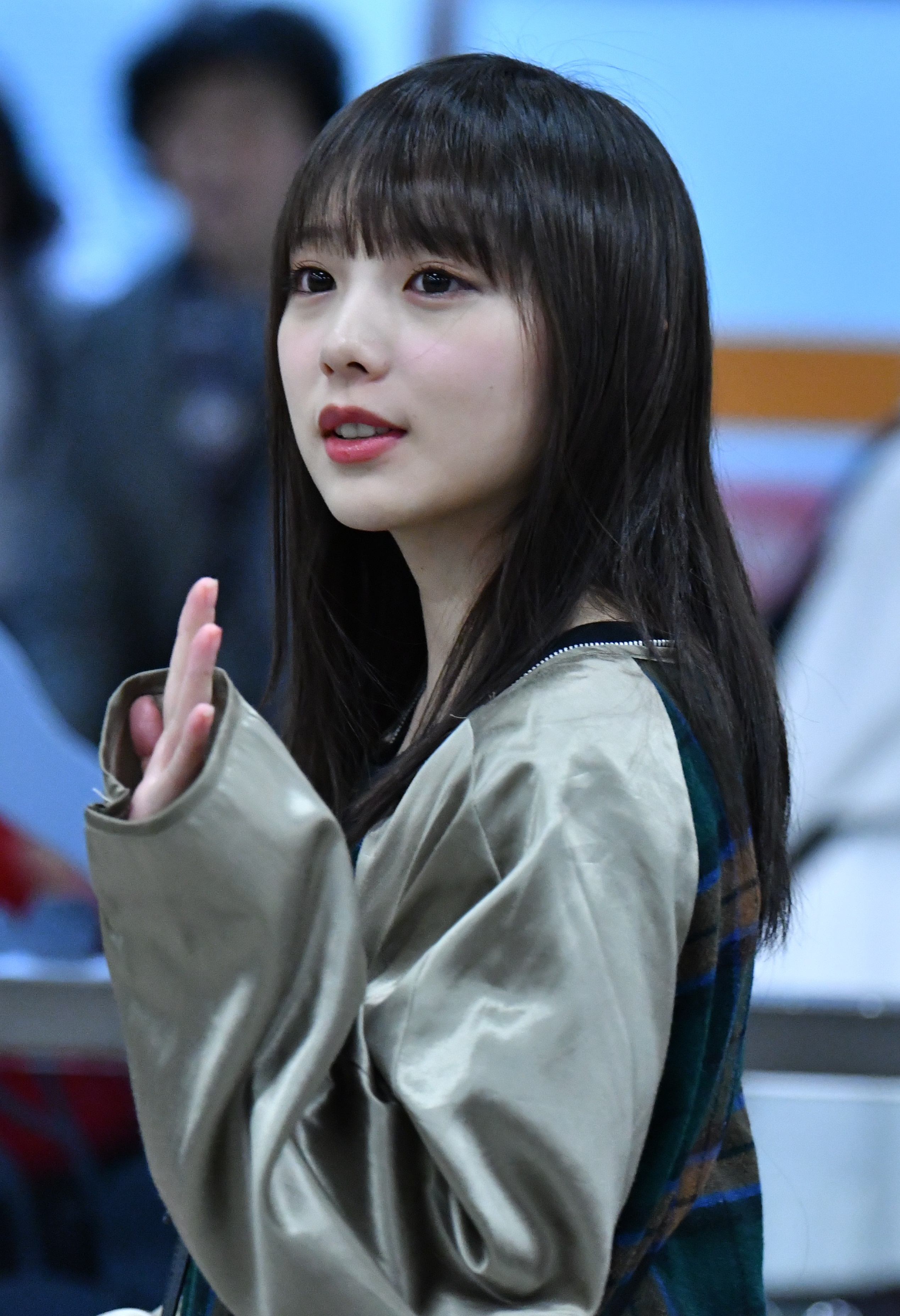 乃木坂46成員在台北國際松山機場。